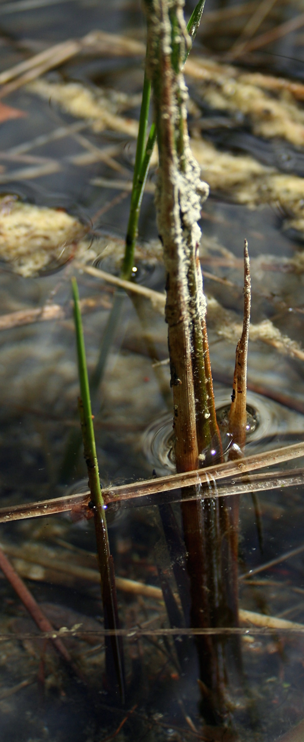 Zaborski Park Krajobrazowy, podstawa łodygi turzycy nitkowatej